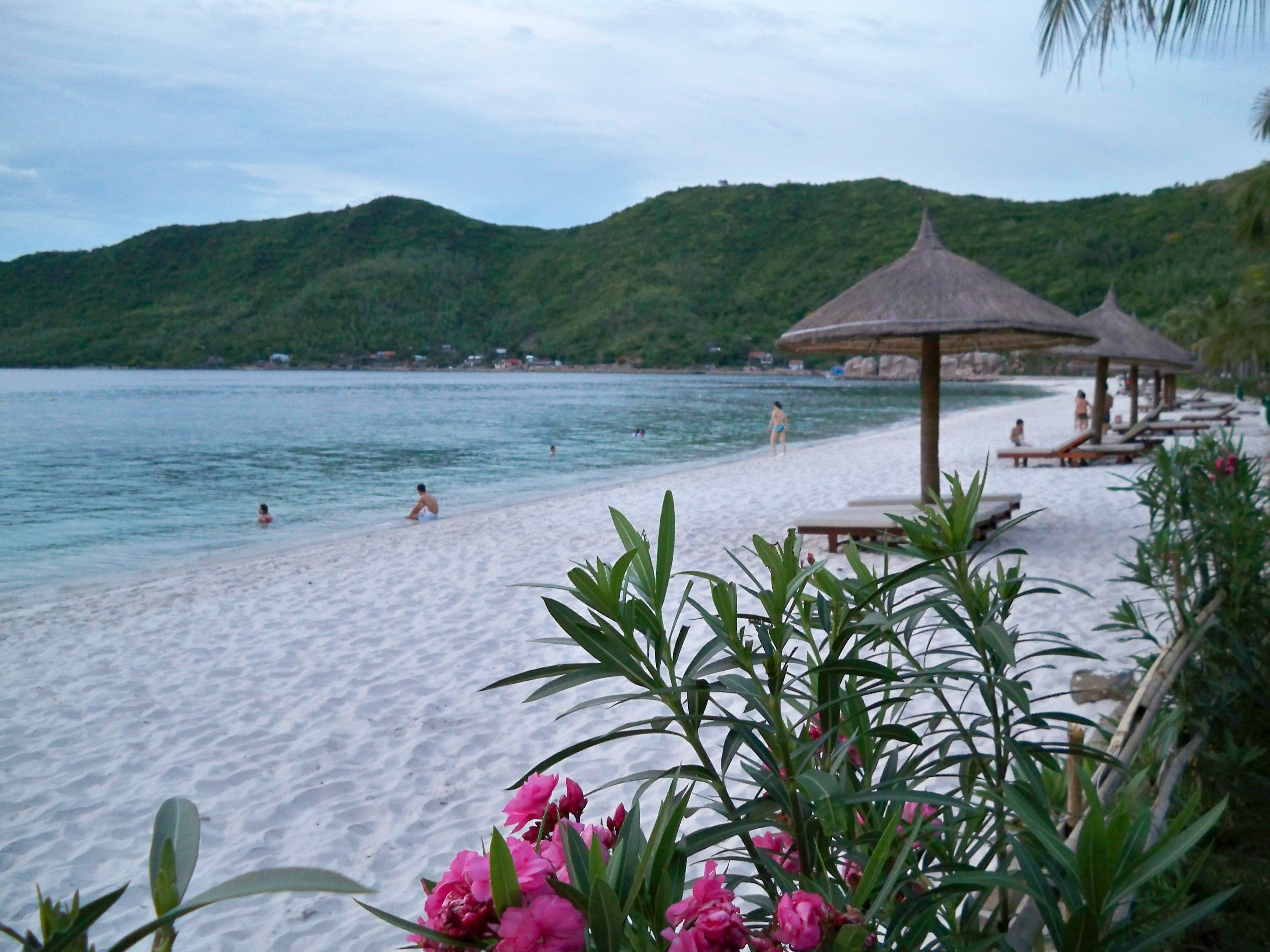 Bãi biển ở Vinpearl Land